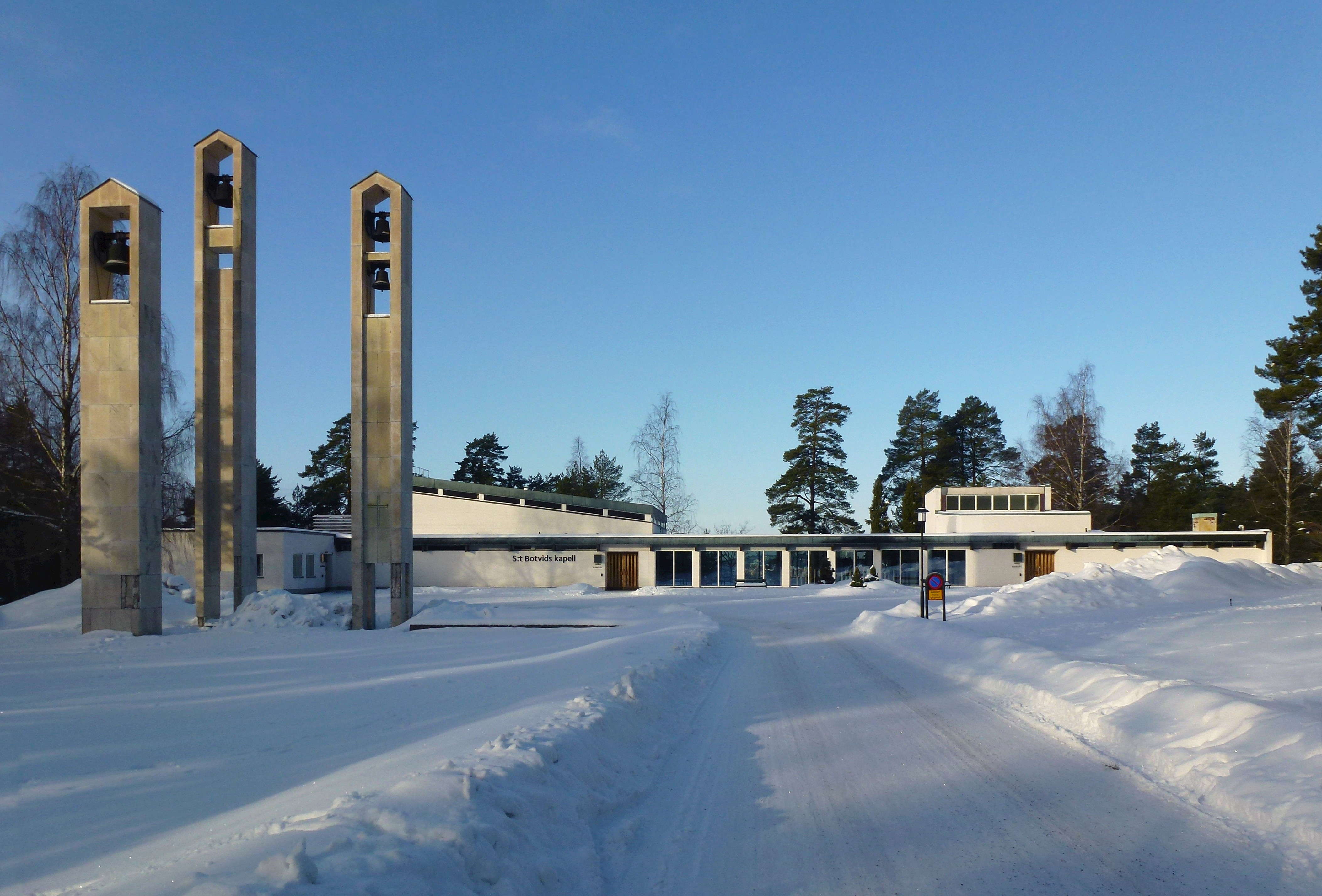 Sankt Botvids begravningsplats , kapell och krematorium, arkitekt Sture Frölén 1961